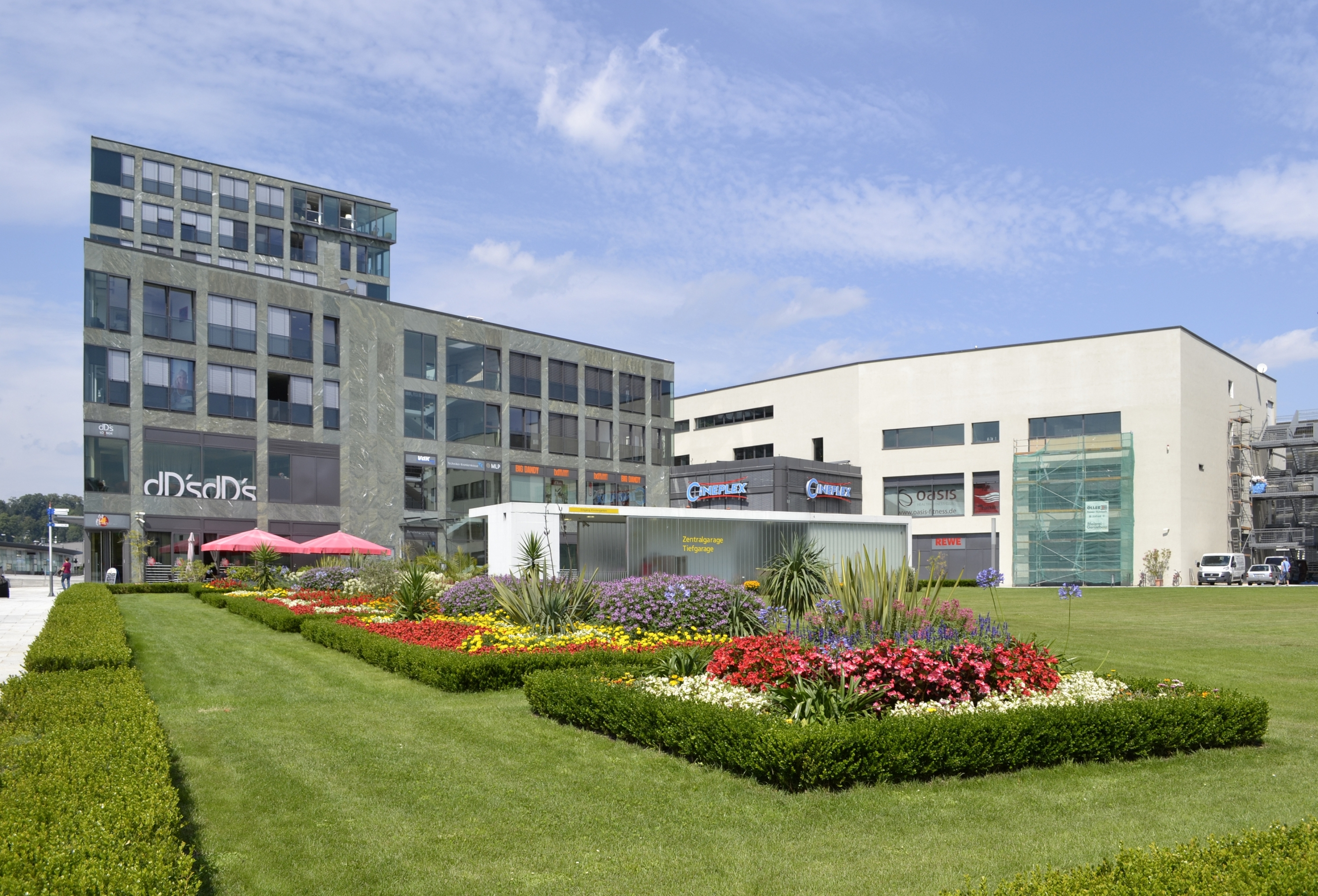 Grünanlage vor dem Stadtturm-Gebäudekomplex der Neuen Mitte Passau.